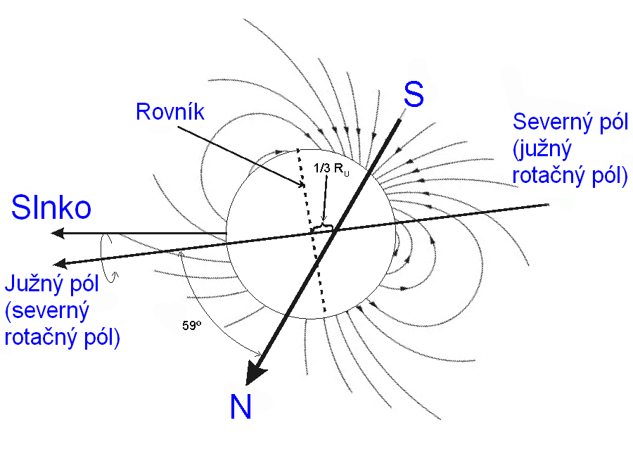 Magnetické pole Uránu